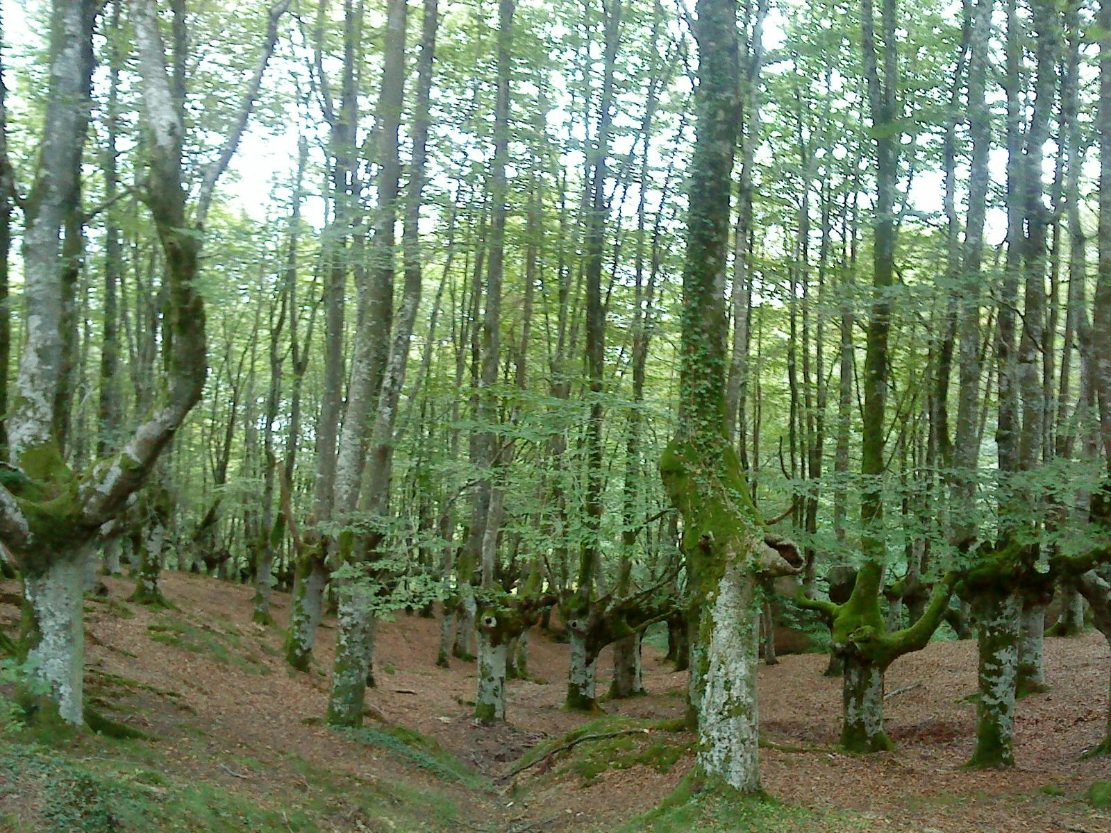 Bosque de hayas en el Parque Natural de Urkiola en Bizkaia, País Vasco (España).